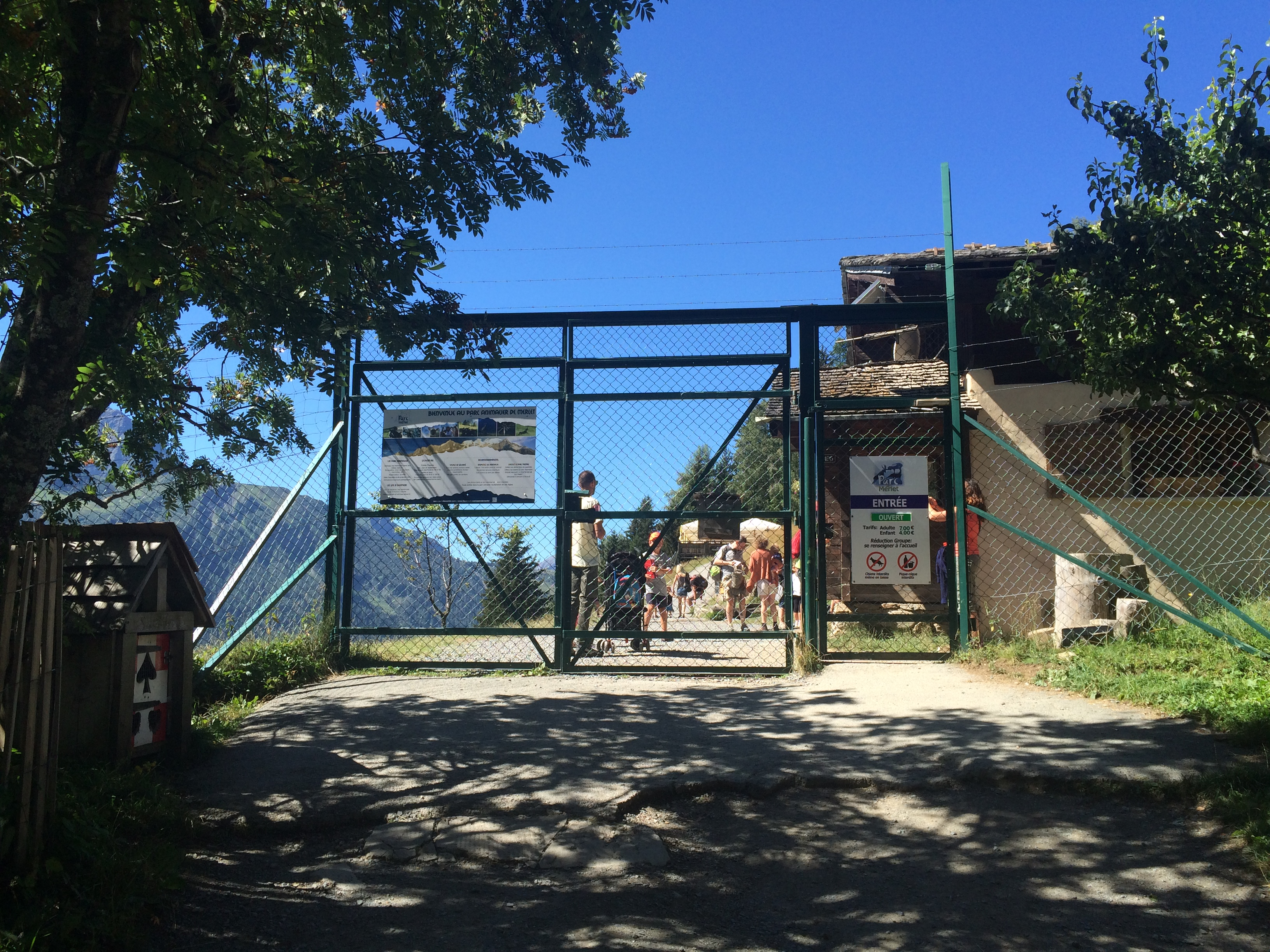 Entrée du parc de Merlet